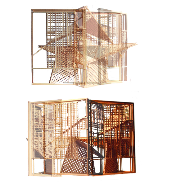 Maquette du monument Photon Propagation Maquette et prise de vue de Jean-Max Albert